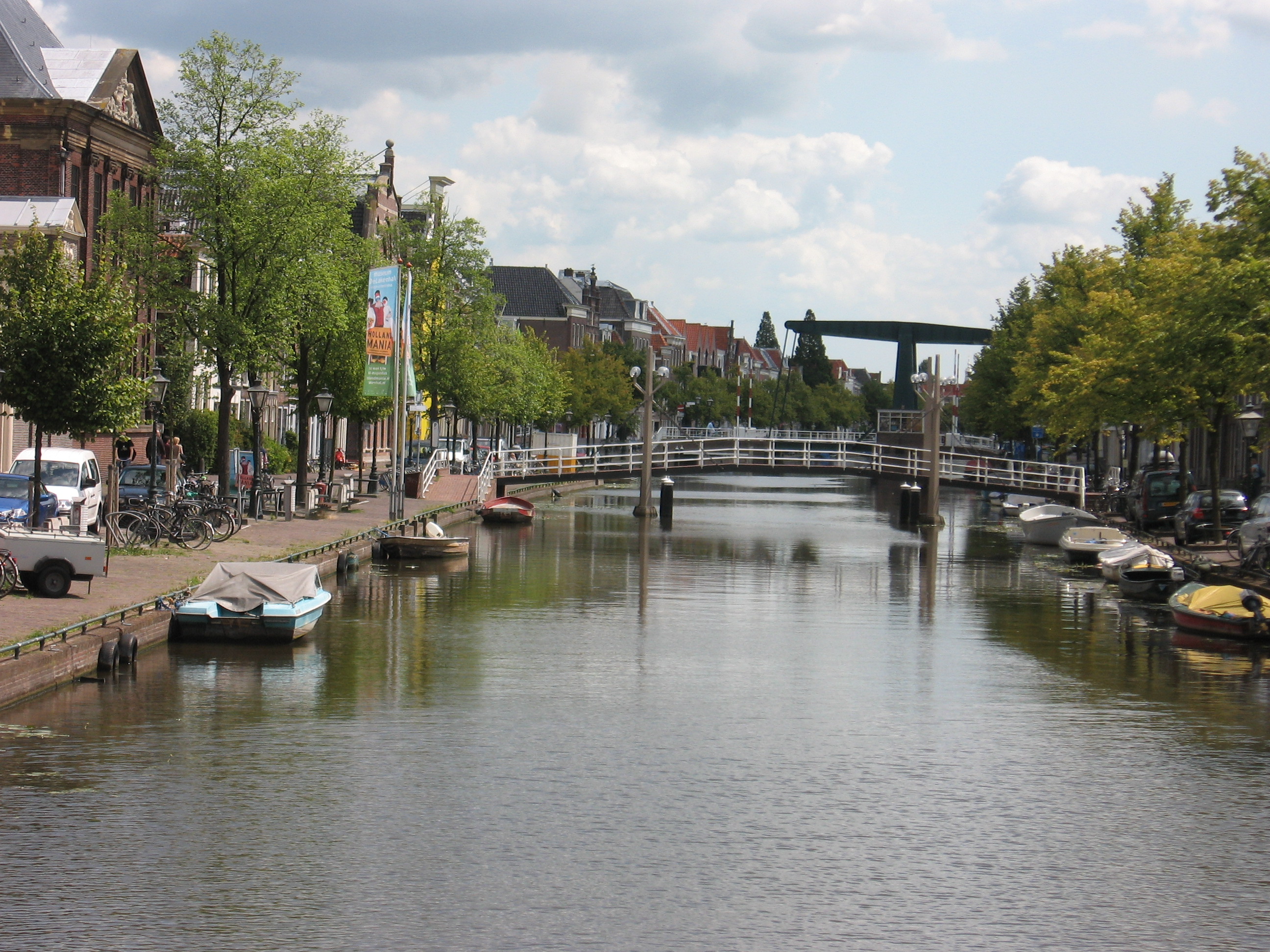 Oude Vest Leiden.jpg